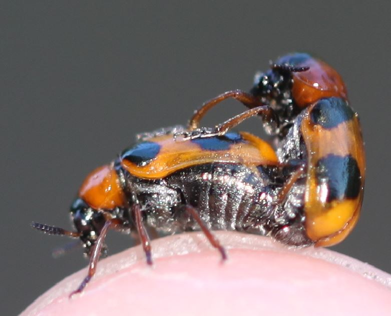 Coptocephala unifasciata bei der Paarung, am 19. Juli 2018 in der Schwetzinger Hardt